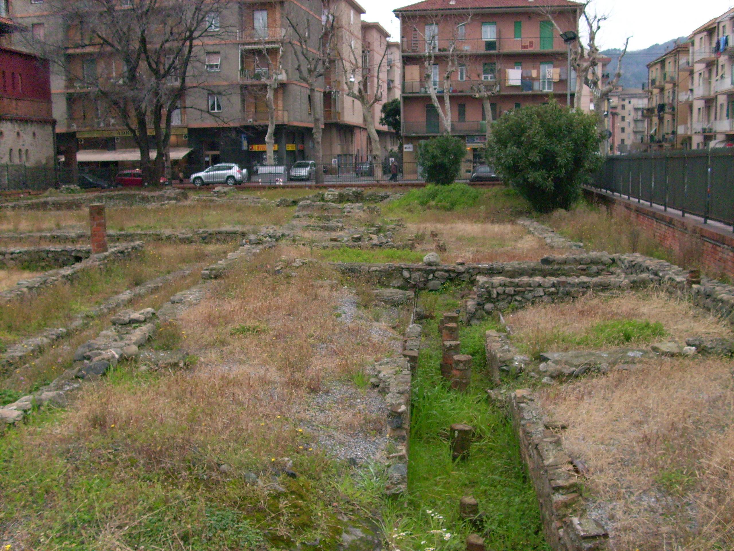 Reperti romani di Albisola Superiore, Liguria, Italy